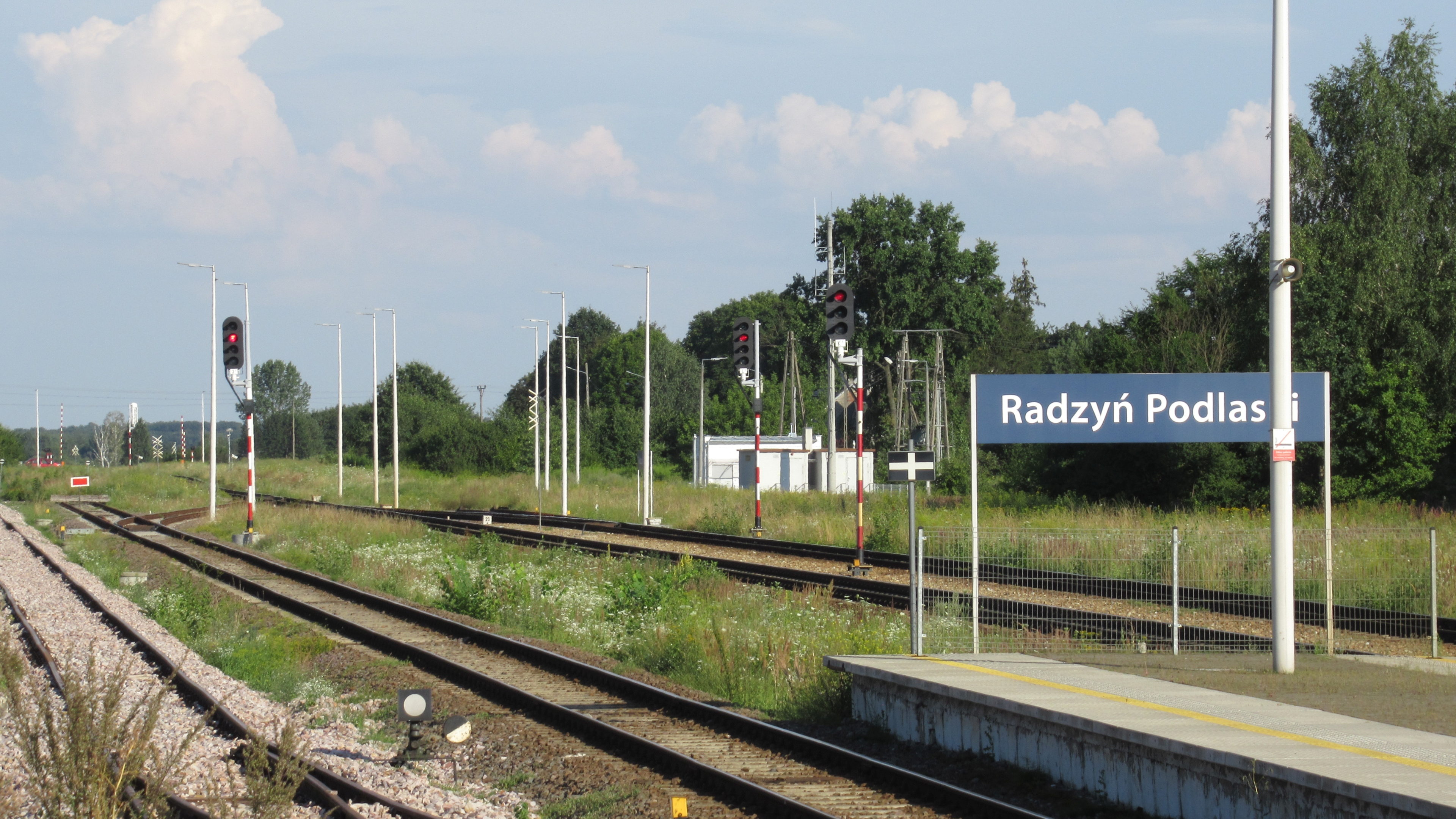 Bedlno Radzyńskie (pow. radzyński, woj. lubelskie, Polska). Stacja „Radzyń Podlaski”.